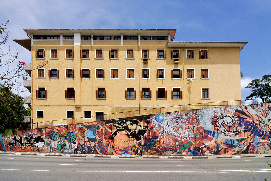 Fassade vom Institut. (fotografiert von der Av. Sumaré)